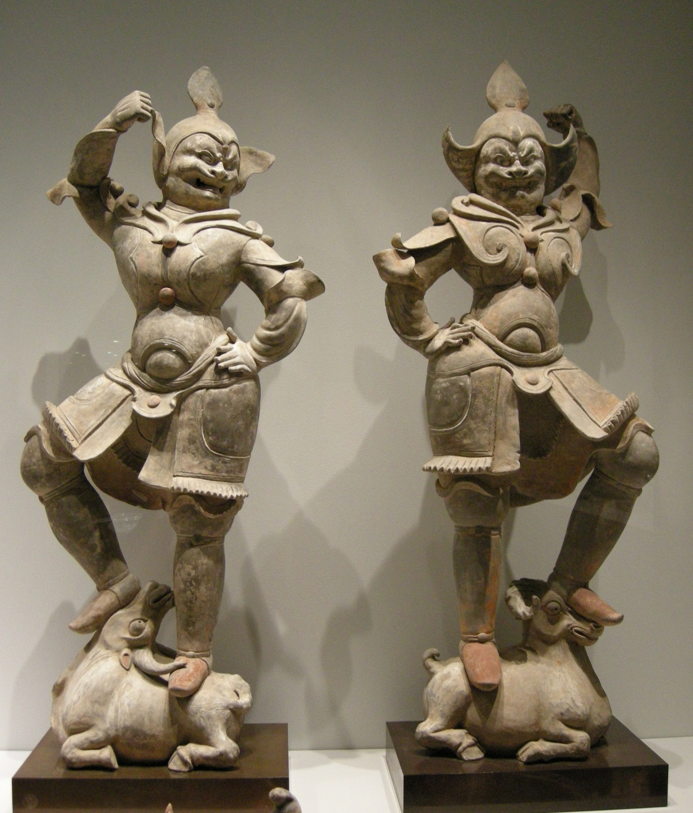 dinastia tang, coppia di guardiani funebri